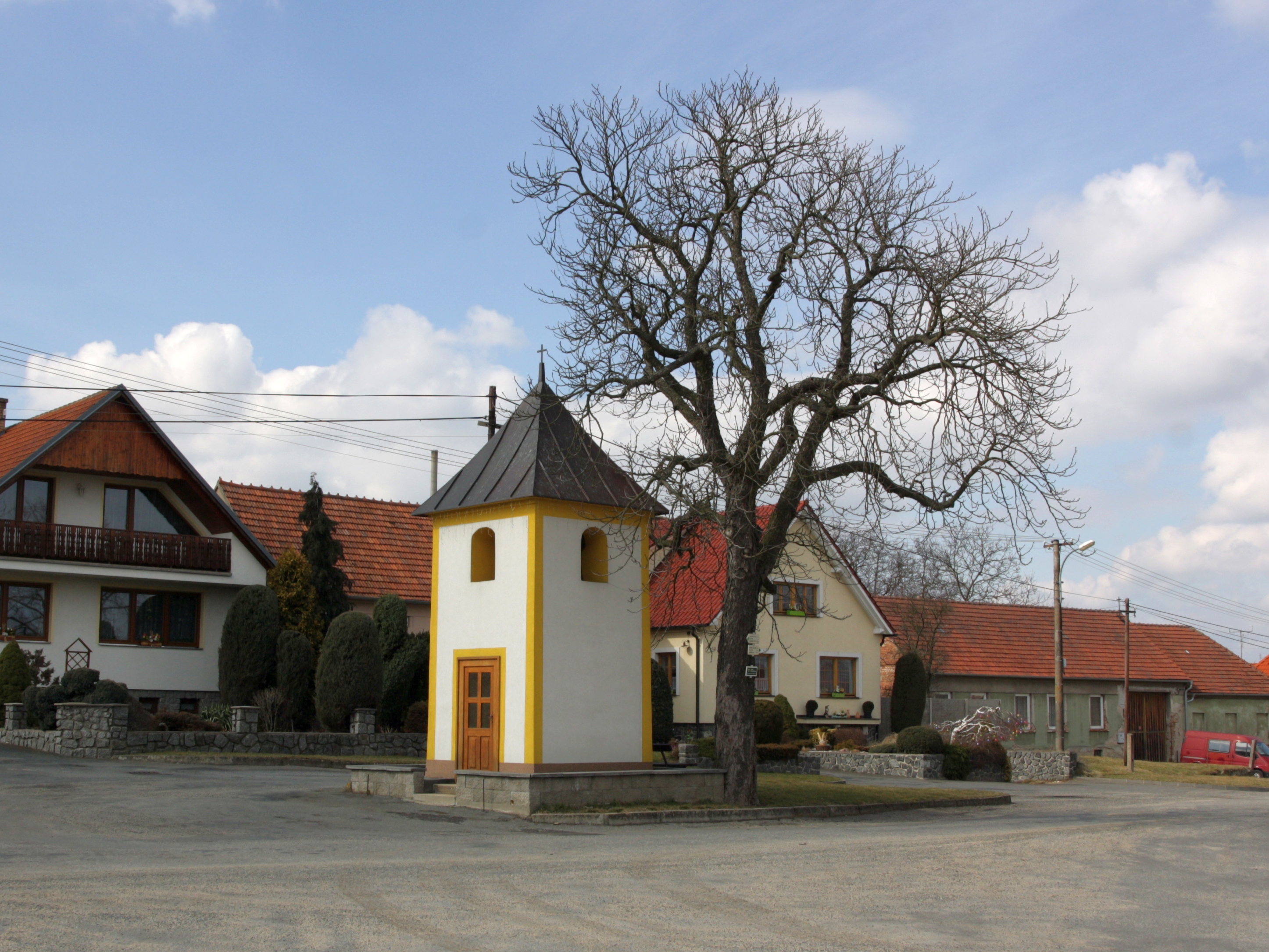 Zňátky - zvonice na návsi